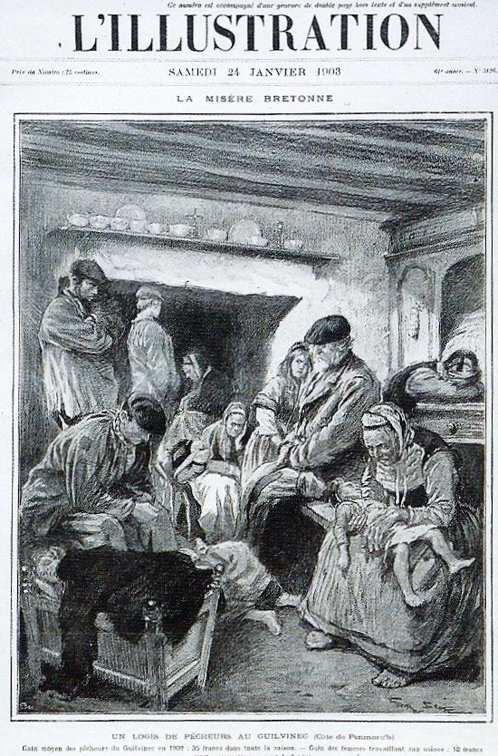 Dessin illustrant la crise sardinière au Guilvinec (revue L'Illustration du 24 janvier 1903)